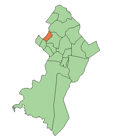 Ubicación de Fdo. de la Mora.